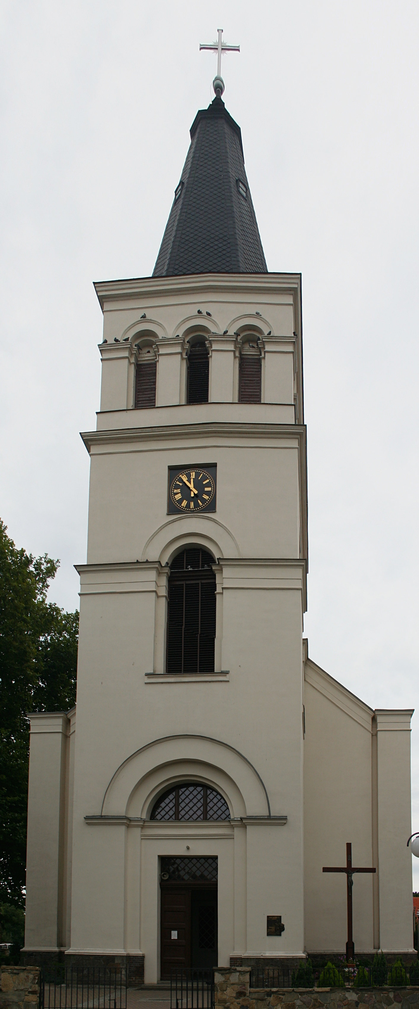 Międzychód, ul. Piłsudskiego. Kościół ewangelicki, ob. rzym.-kat. par. p.w. Niepokalanego Serca Maryi, 1838.